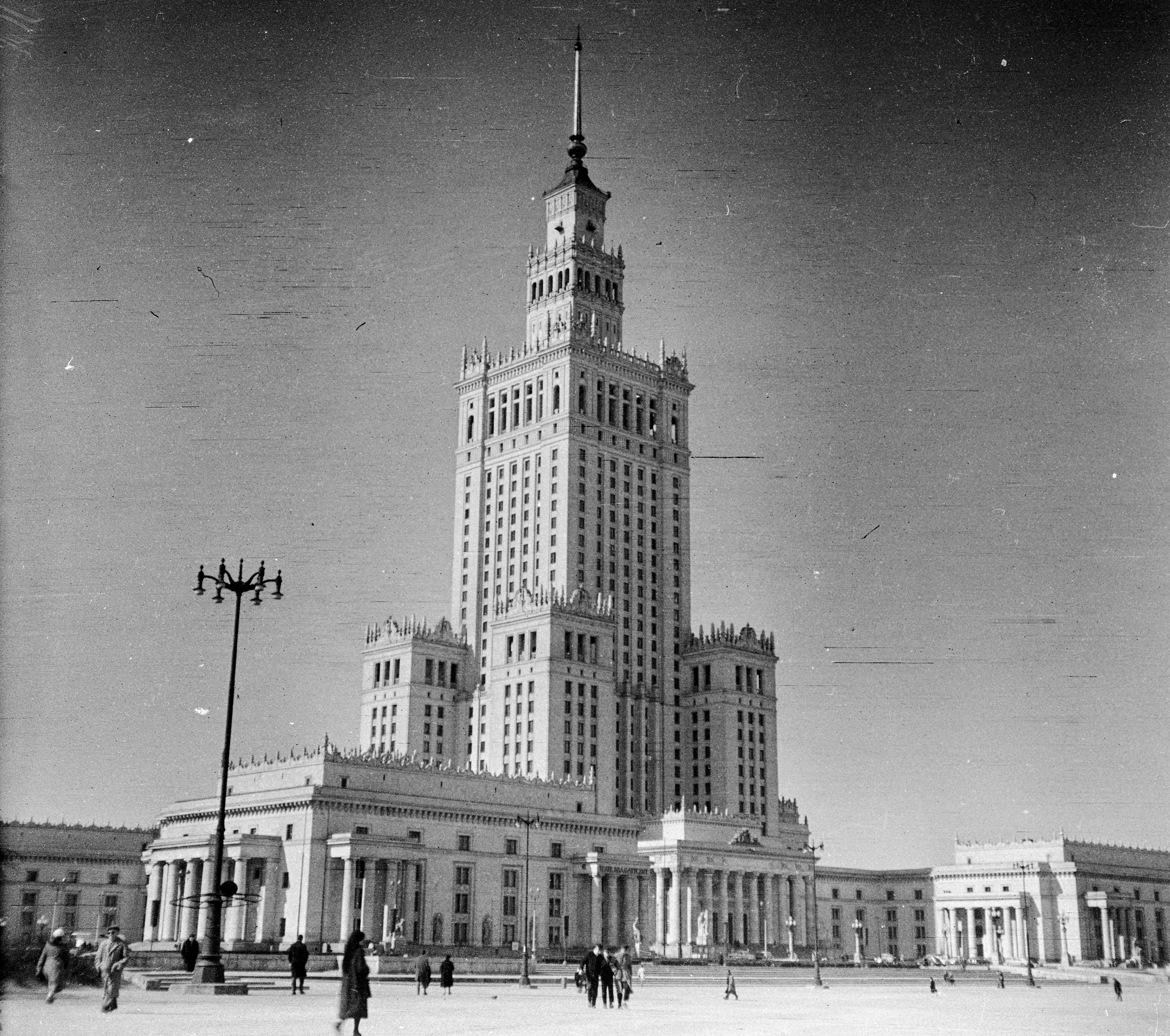 a Kultúra és Tudomány Palotája. Location: Poland, Warsaw Title: a Kultúra és Tudomány Palotája.